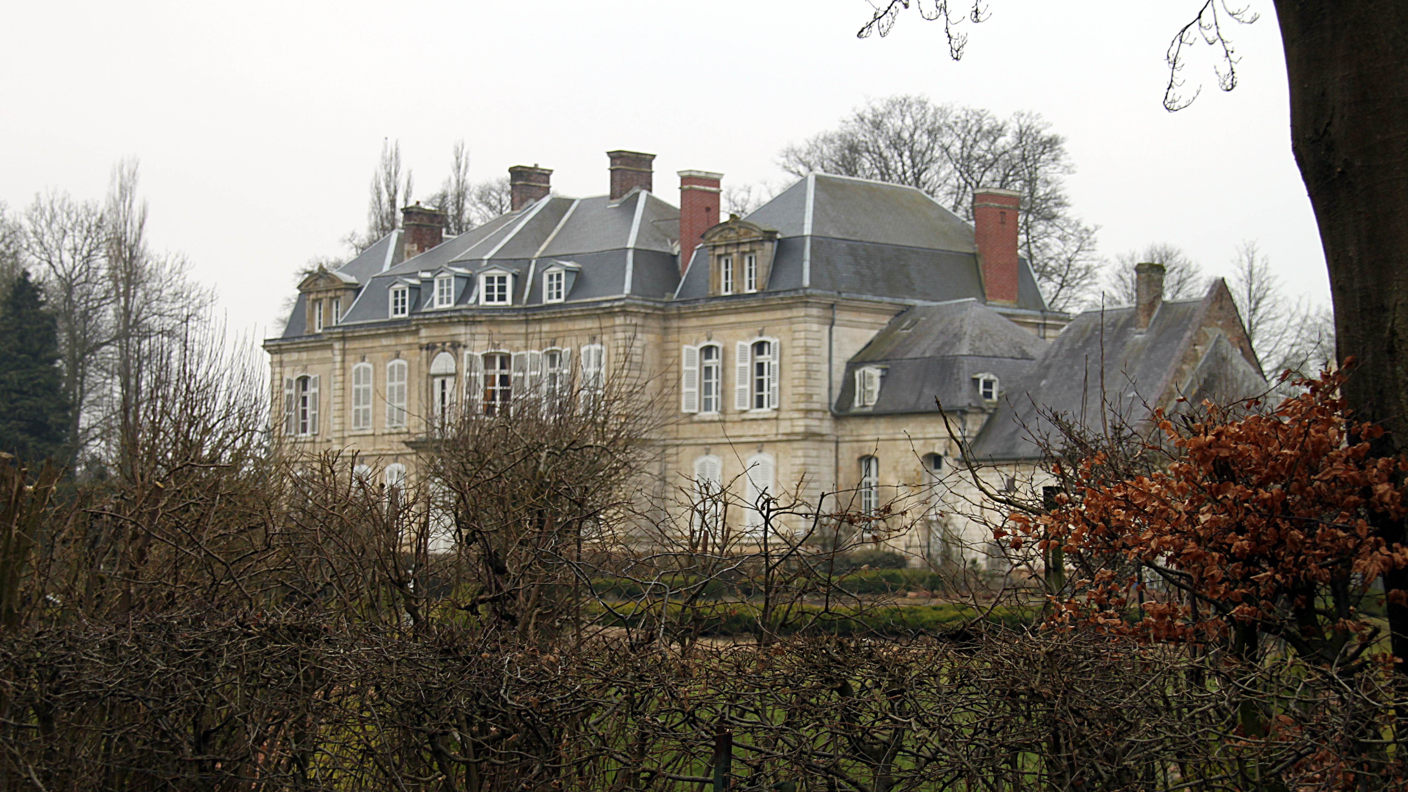 Le château côté jardins. peu d'infos, aurait été bâti en 1746.